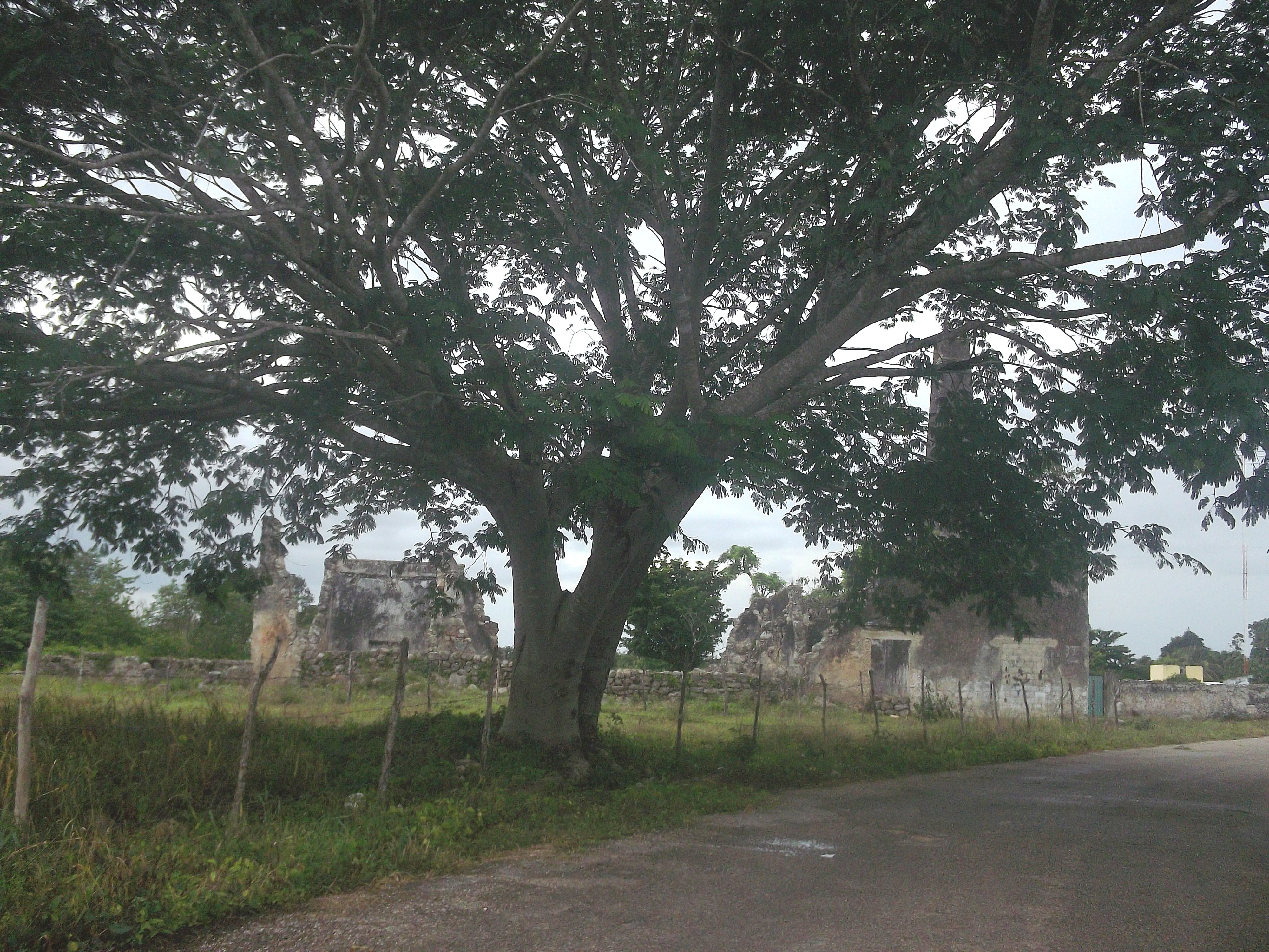 Vista de la hacienda Walis, Yucatán.